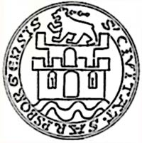 Alv Erlingssons (?-1290) segl.